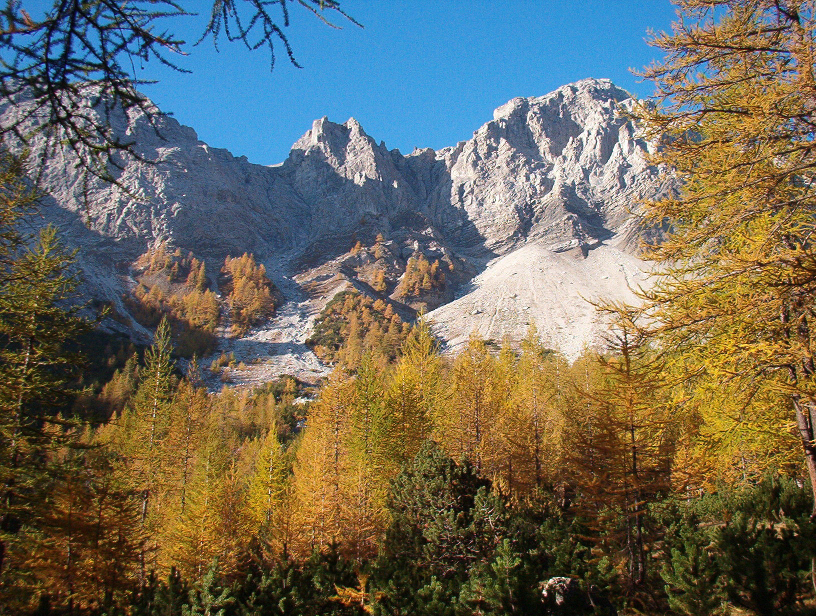 Grand'Hoche - Alpi Cozie - Piemonte - Italy